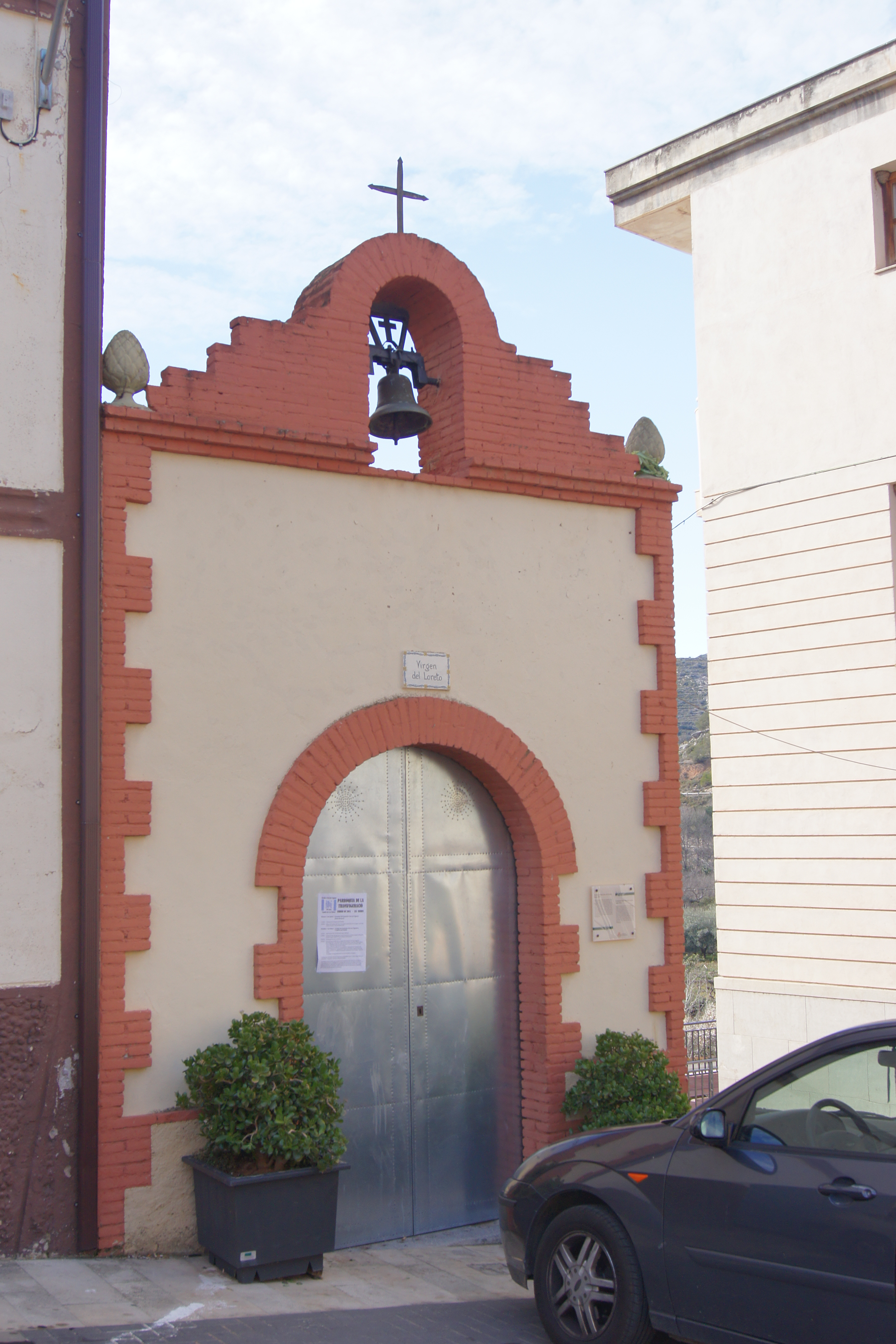 Ermita de Nuestra Señora de Loreto, Bien de Relevancia Local de la localidad de Les Useres o Useras en la provincia de Castellón, España.